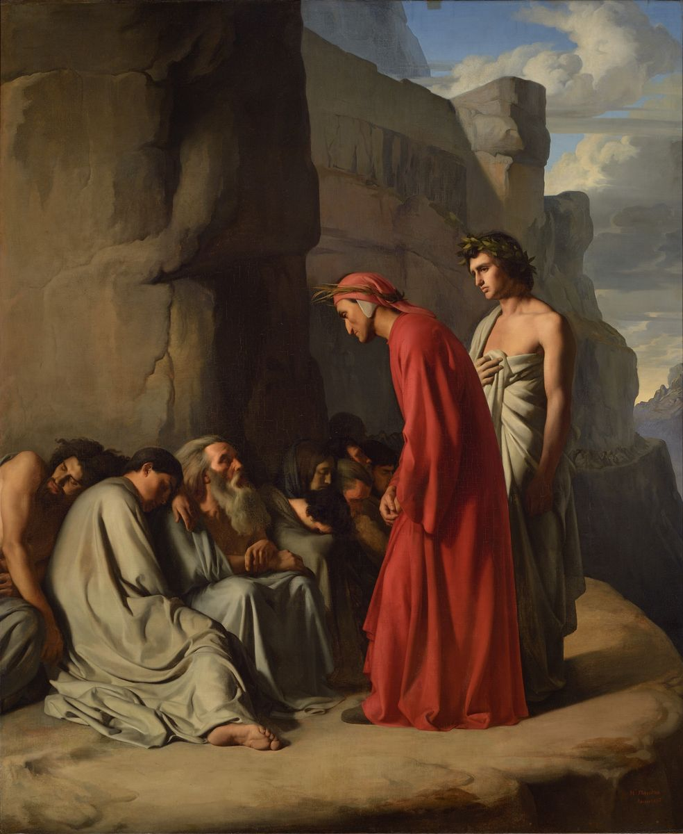 Peinture